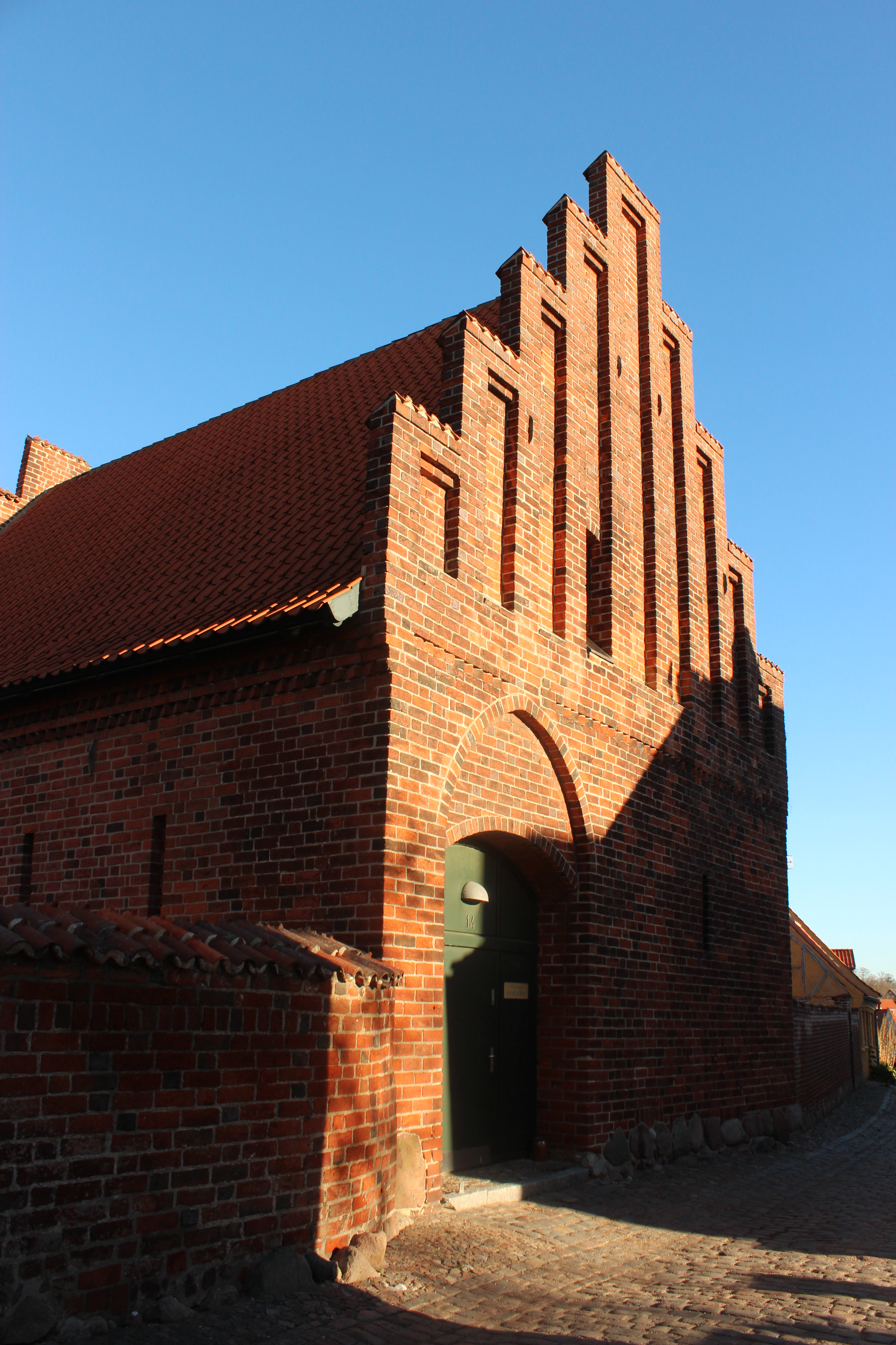 Præstegade 16 i Kalundborg. Facaden ud mod præstegade